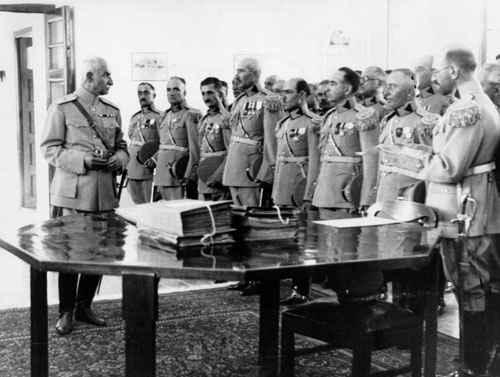 L'empereur d'Iran Reza Chah et ses chefs militaires, vraisemblablement pendant la Seconde Guerre Mondiale